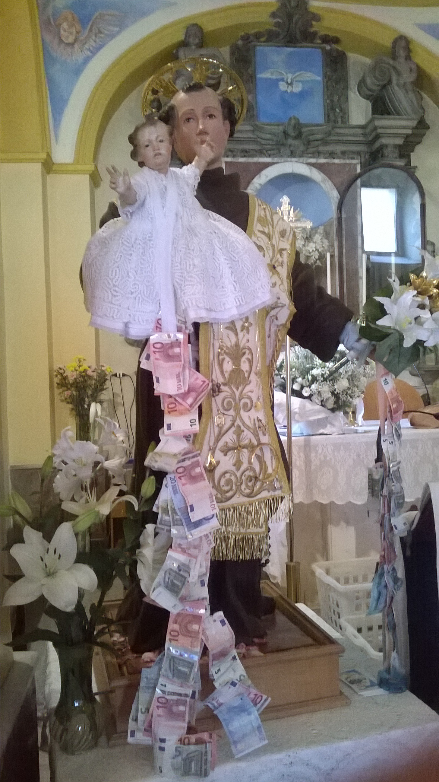 La venerata statua di Sant'Antonio di Padova a Colli